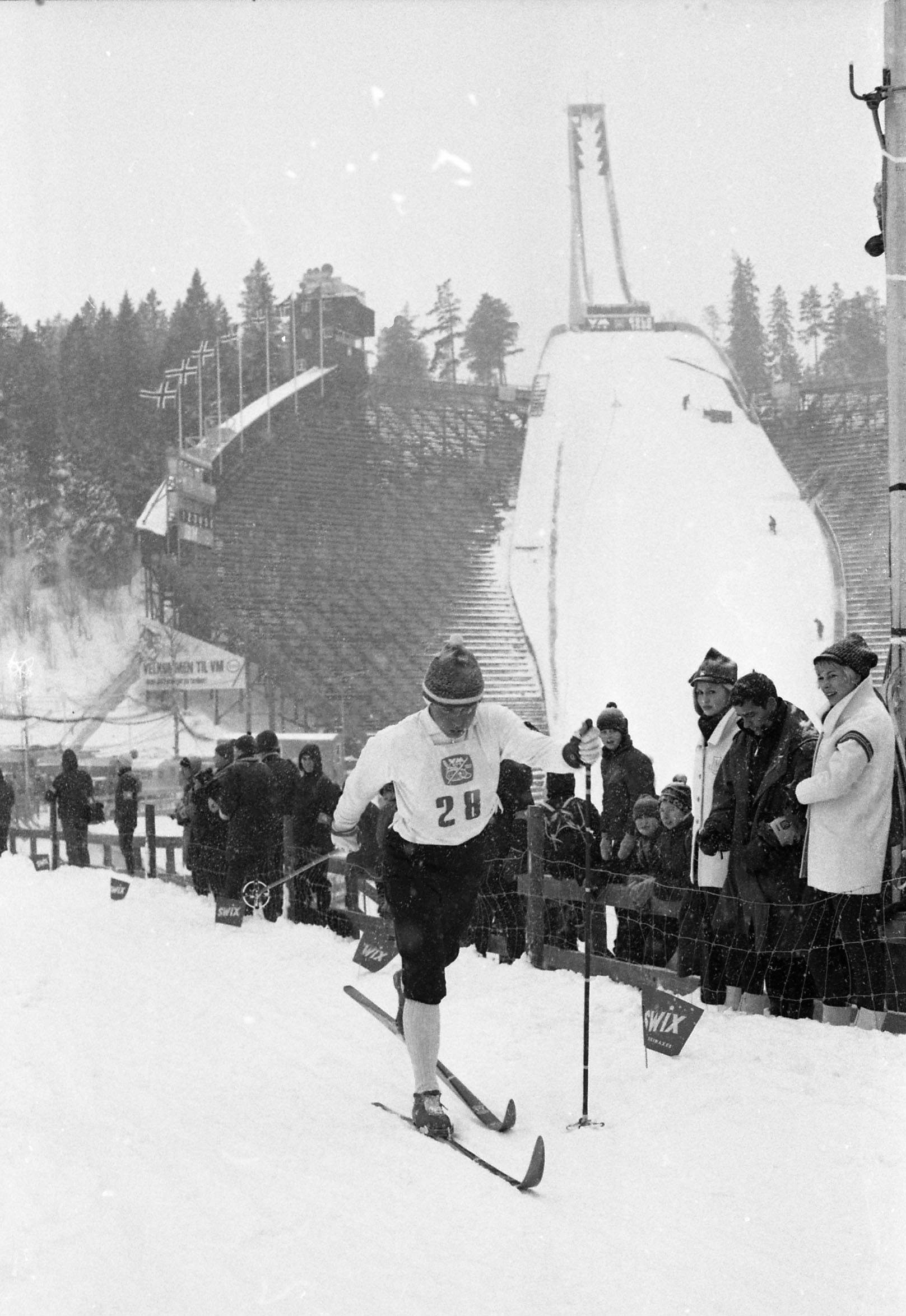 Beskrivelse:Gullvinner Georg Thoma, 15 km langrenn kombinert, VM på ski i Oslo 1966. Fotograf: Billedbladet NÅ/van Deurs Sted: Oslo År: 1966 Arkivreferanse: RIKSARKIVET- RA/PA/0797/U/Ua/3901_3_013 GOLD WINNER GEORG THOMA, 15 KM NORDIC COMBINED, WORLD CHAMPIONSHIPS IN OSLO 1966 Photographer: Billedbladet NÅ/van Deurs Place: Oslo Year: 1966 Archival reference: RA/PA/0797/U/Ua/3901_3_013